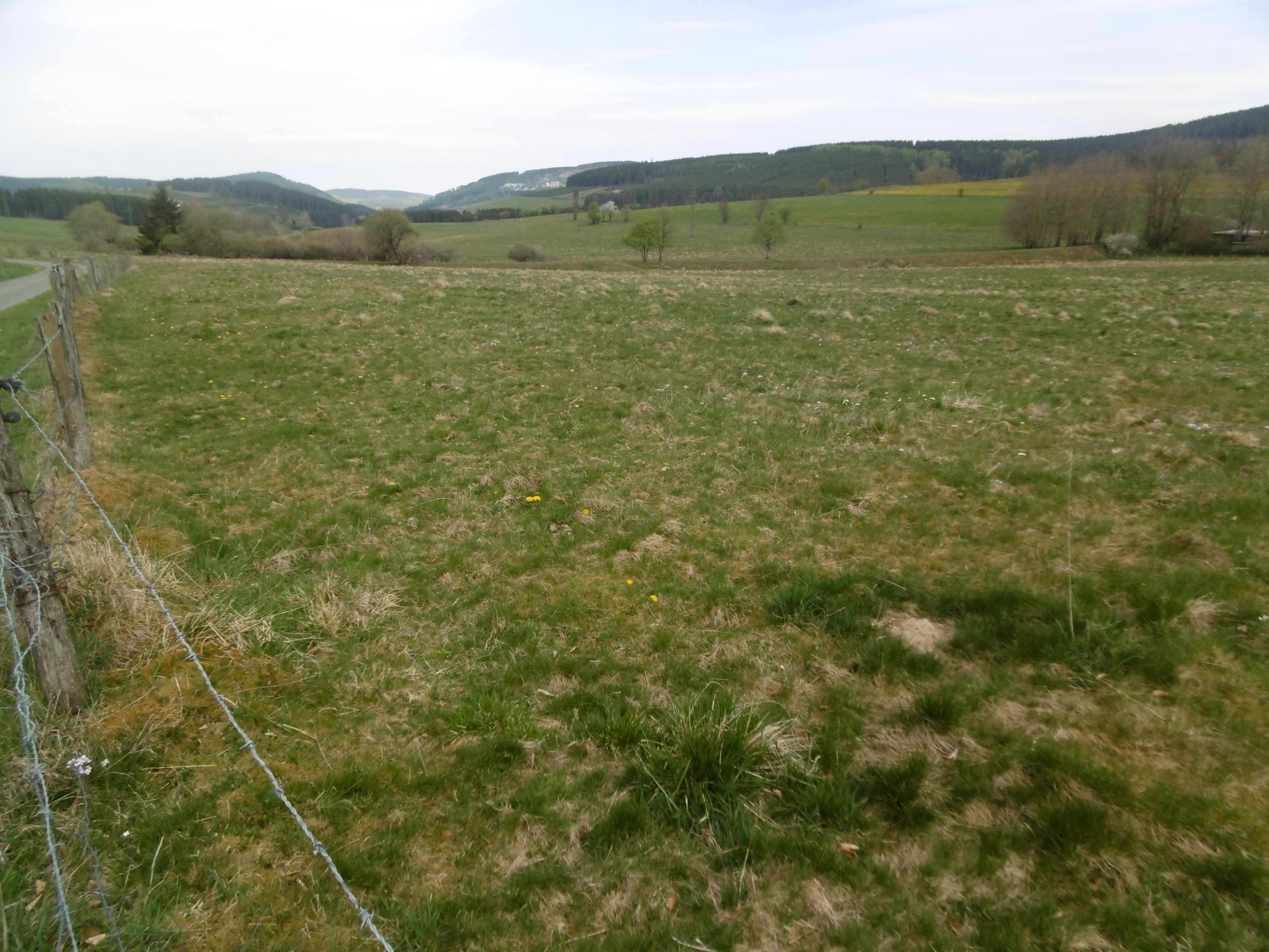 Naturschutzgebiet Neue Born – Oberes Hilletal​ von der Südostecke. Im Hintergrund Teile von LSG's.